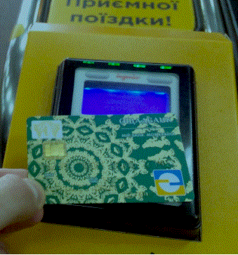 Metro ПРОСТІР